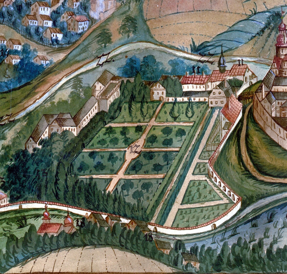 Výřez zámecké zahrady z veduty Vyskova_1720 (Vyškov- czech republic)